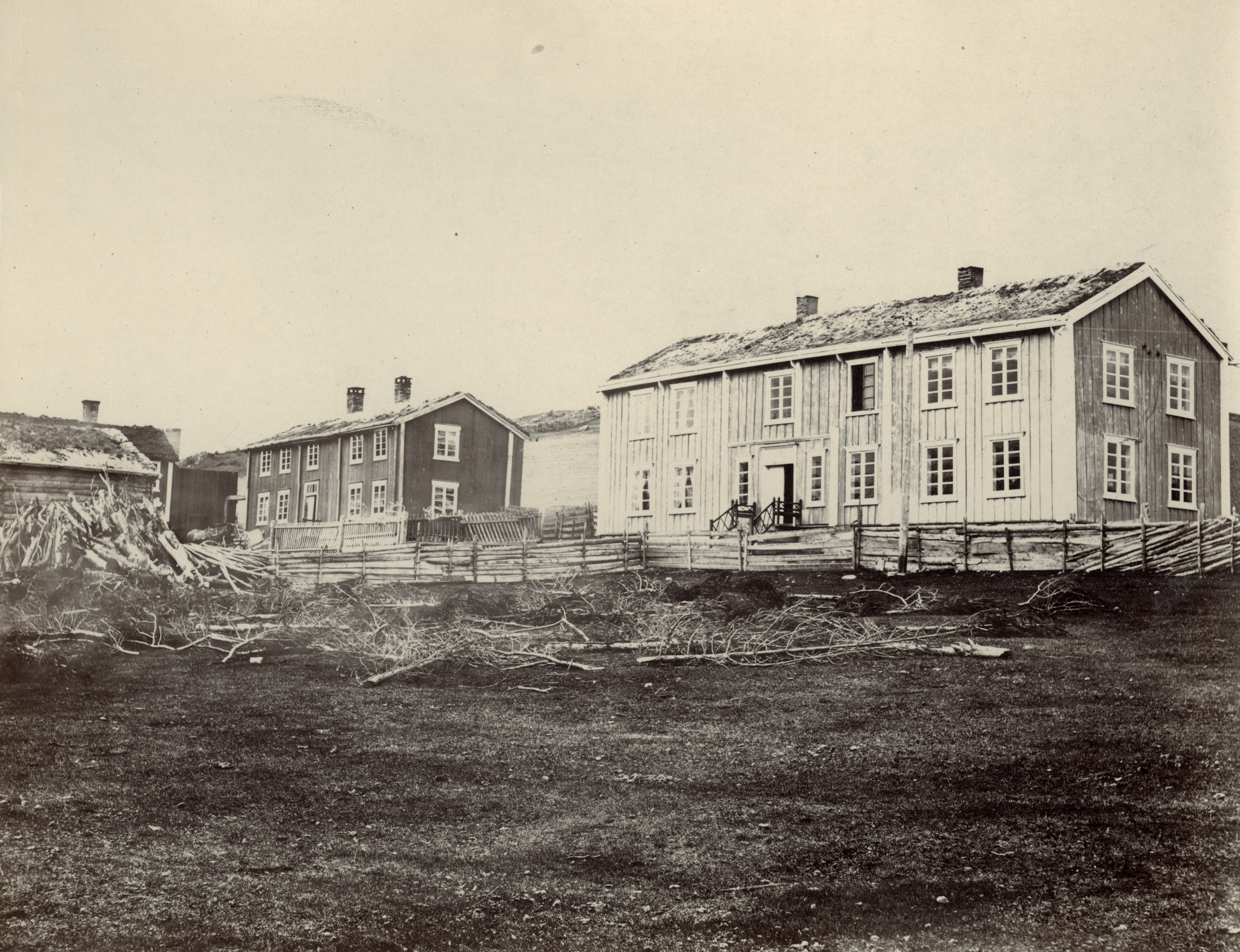 Dombås Skysstasjon i Dovre, Oppland This image on crowdsourcing geotagging platform Fotodugnad